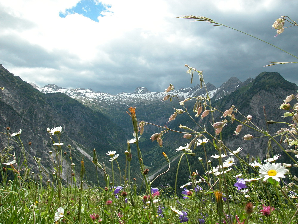 Blick ins Gadental (Großes Walsertal, Vorarlberg)